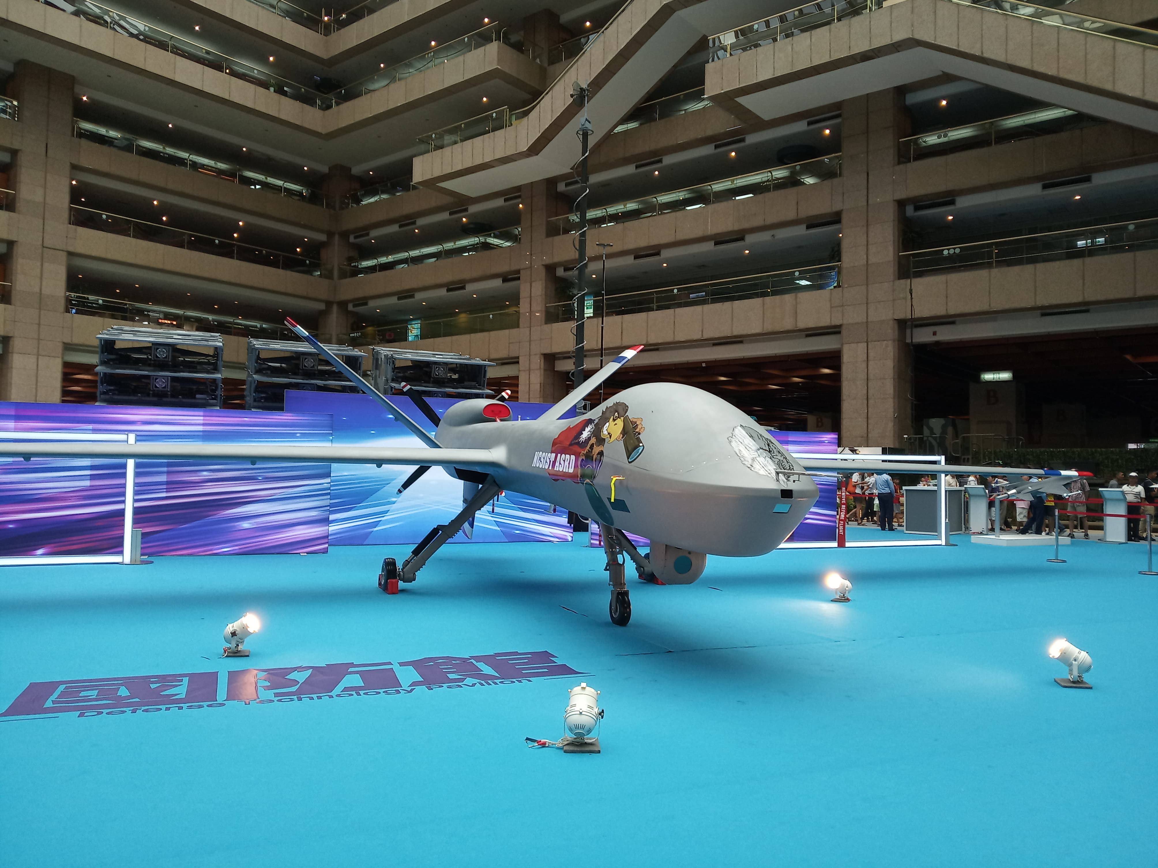 Medium-altitude long-endurance unmanned aerial vehicle designed by NCSIST,Republic of China